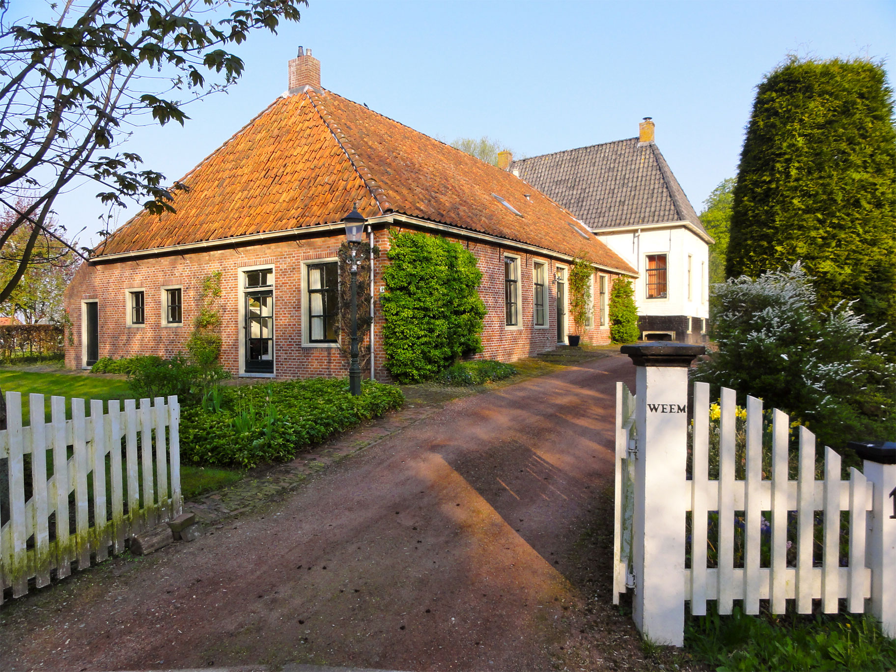 Hervormde pastorie (De Weem)